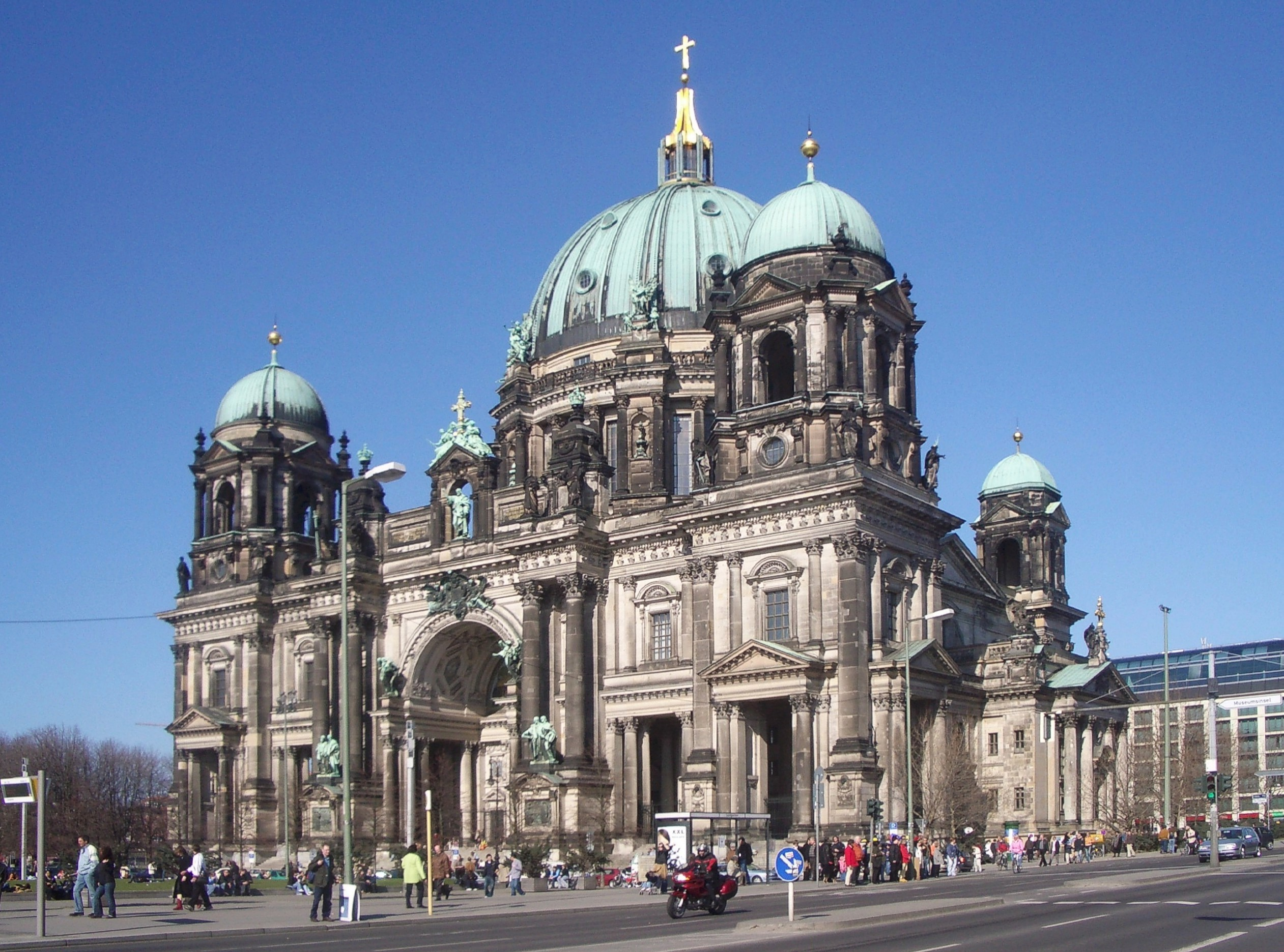 Berlin, Mitte, Spreeinsel, Am Lustgarten: Berliner Dom